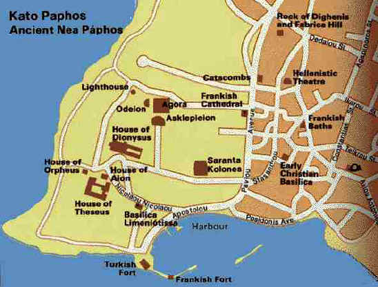 Схема стародавньої частини Пафосу (Неа Пафосу)